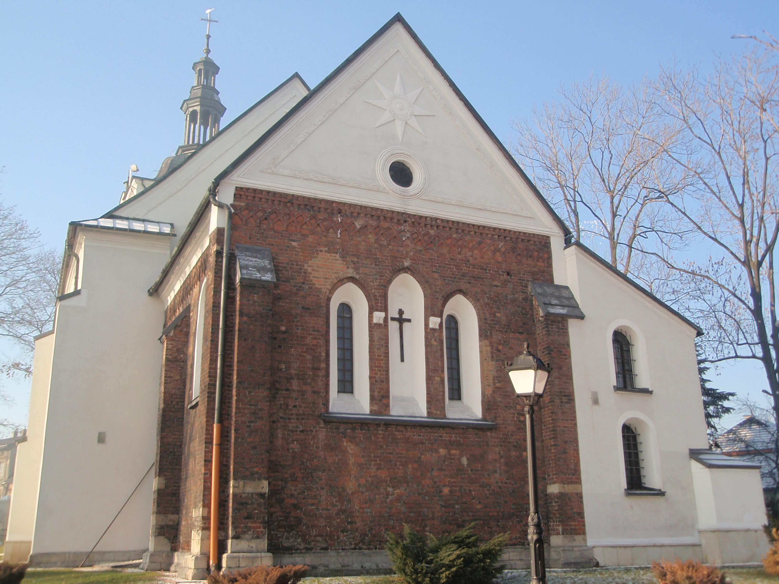 Kościół w Sławkowie (woj. śląskie)